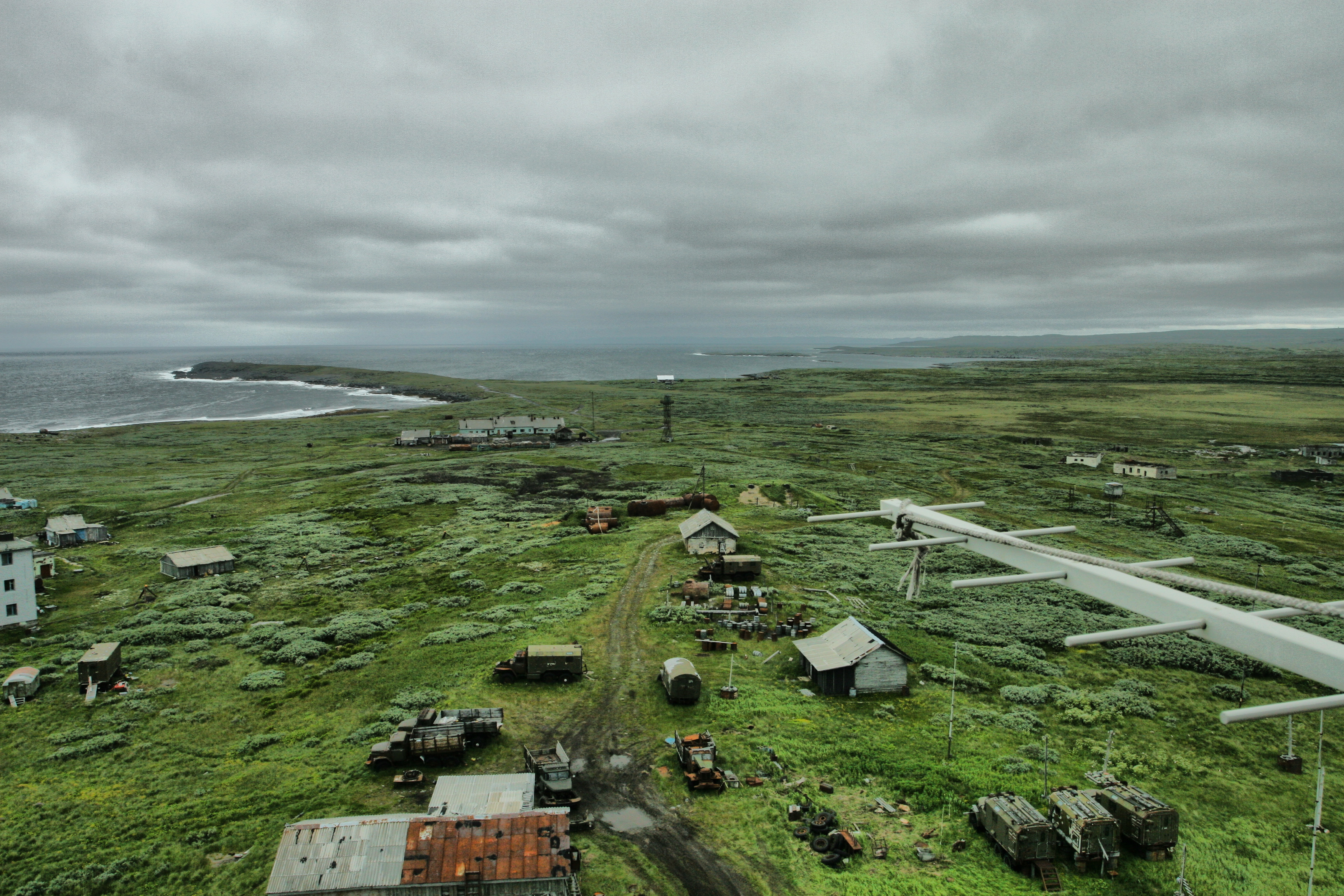 Цып-Наволок,_вид_на_мыс_с_маяка